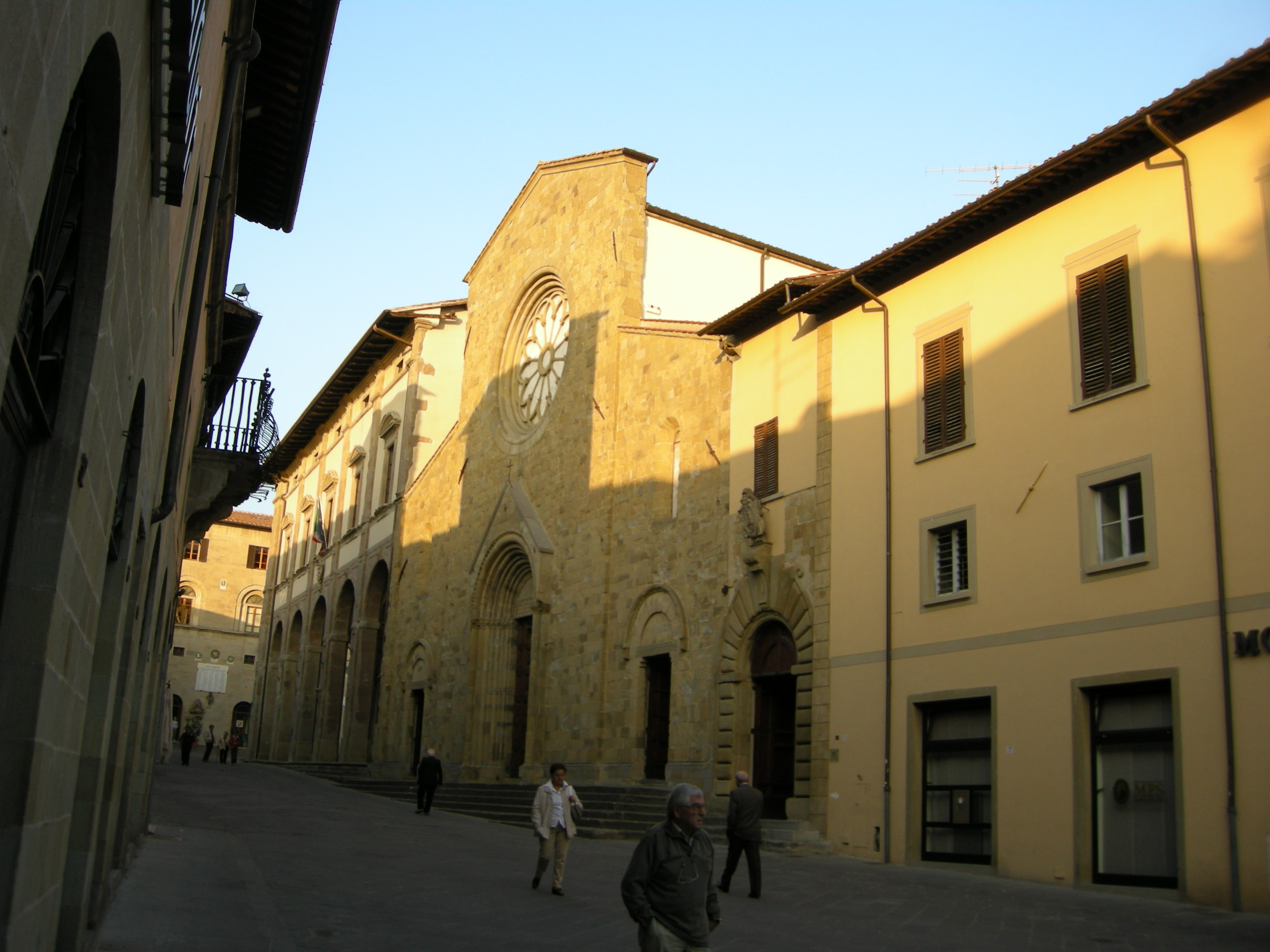 Duomo di sansepolcro, esterno, e palazzo vescovile